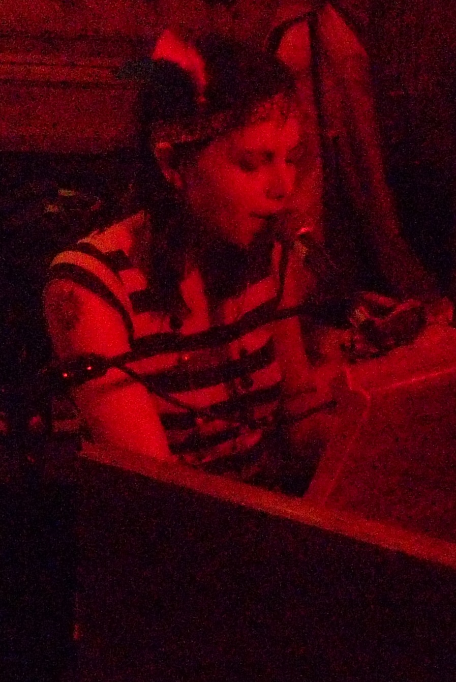 Grainy Bloem deLuxe